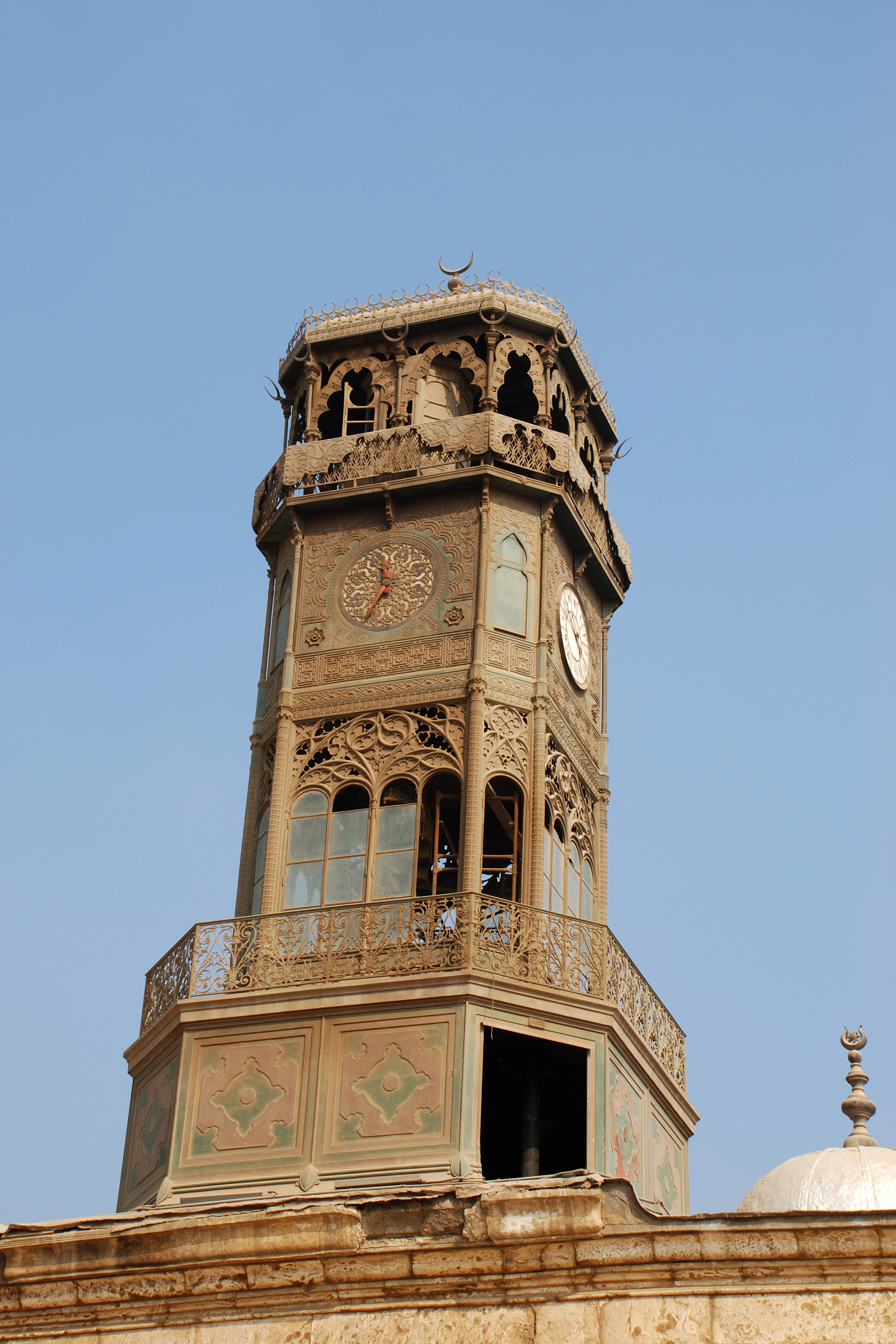 Torre-dellorologio-nella-Moschea-di-Mohamed-Ali-3